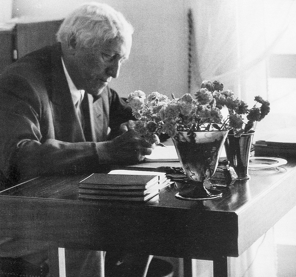 Carl Milles vid sitt skrivbord 1955